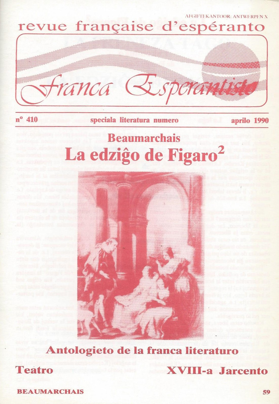 kovrilo de "La Edziĝo de Figaro", 1990